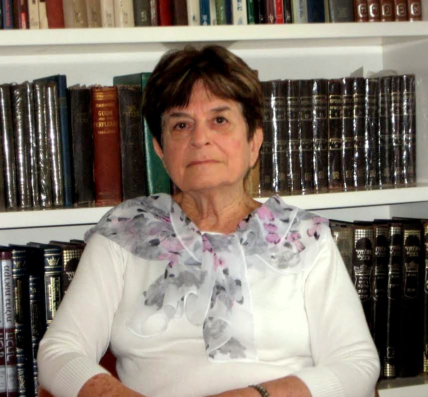 פרופ' טובה כהן (נולדה ב־1946) חוקרת את הספרות העברית של המאה ה-19, כתיבת נשים ומנהיגות נשית; חברת סגל אוניברסיטת בר-אילן